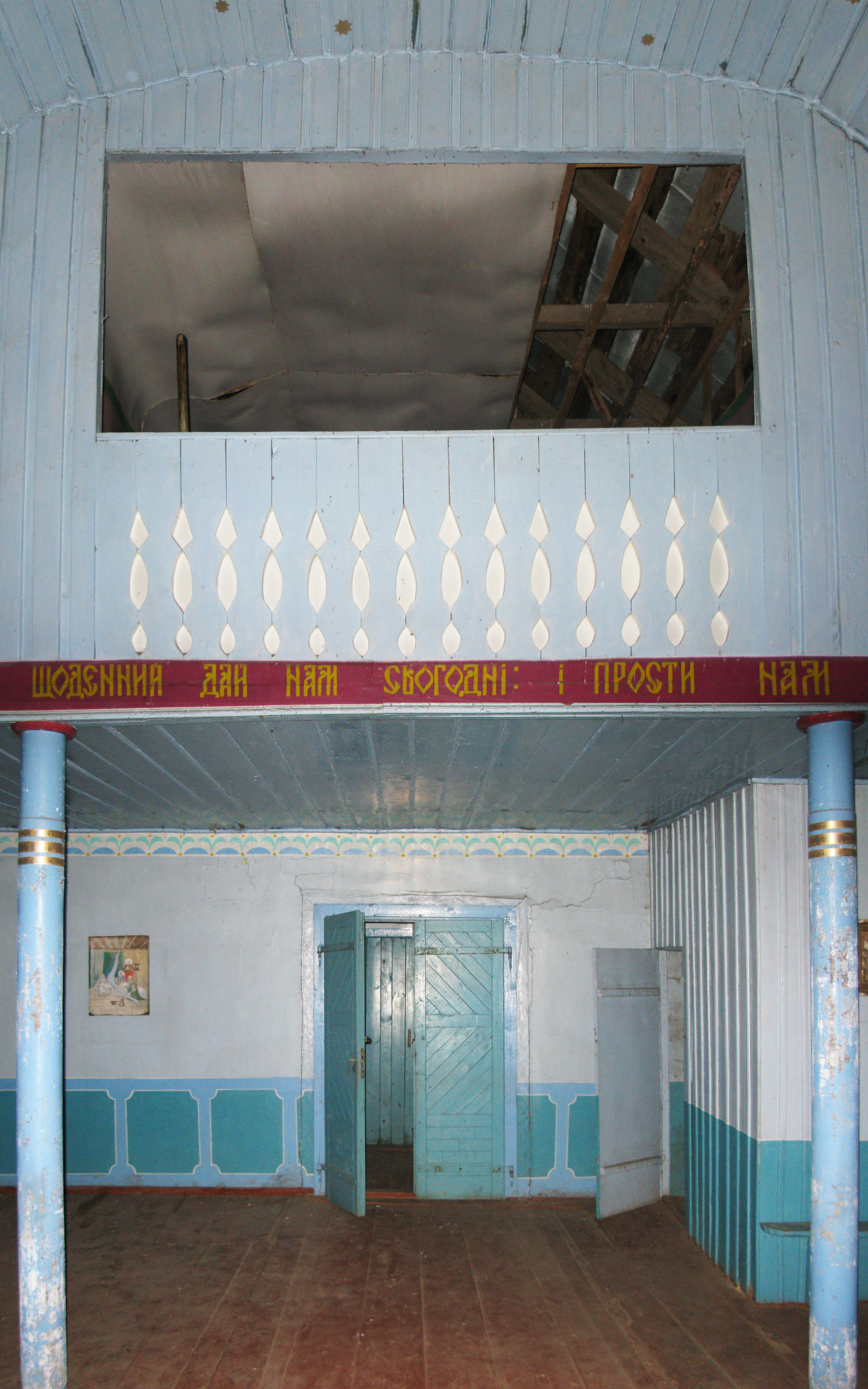 Хори буянівської старої церкви